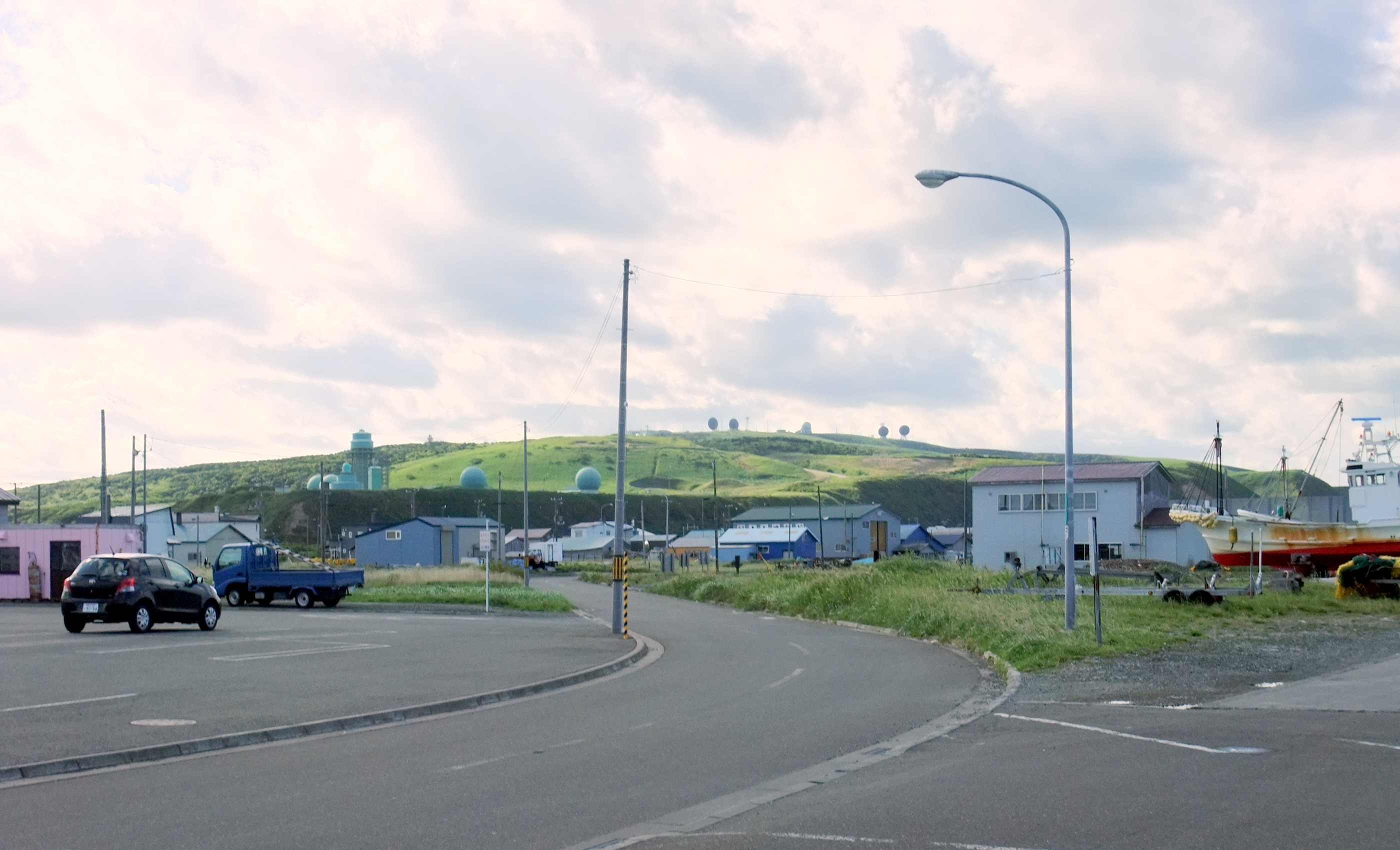 陸上自衛隊基地